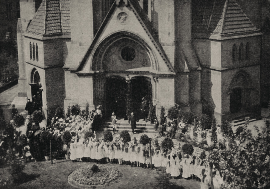 Der Kronprinz die Friedenskirche in Begleitung von Oberbürgermeister Wilhelm Marx verlassend, am 11. Mai 1907, nach der Übergabe der Wandgemälde Professor Eduard von Gebhardts in der Kirche, Foto Hugo Klippert Düsseldorf